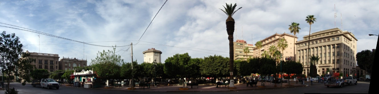 Centro Histórico de Torreón Plaza de Armas